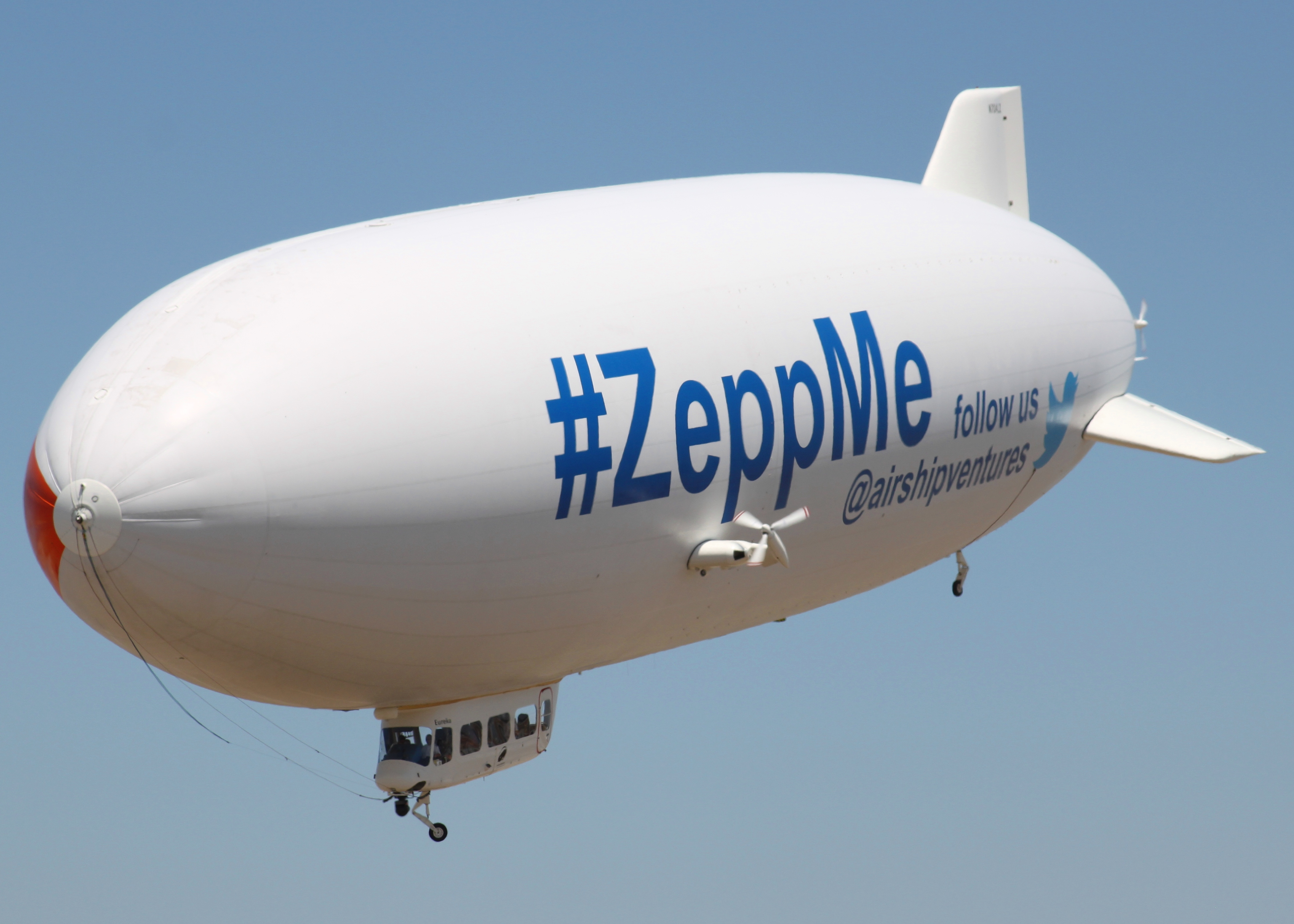 Zeppelin on Approach